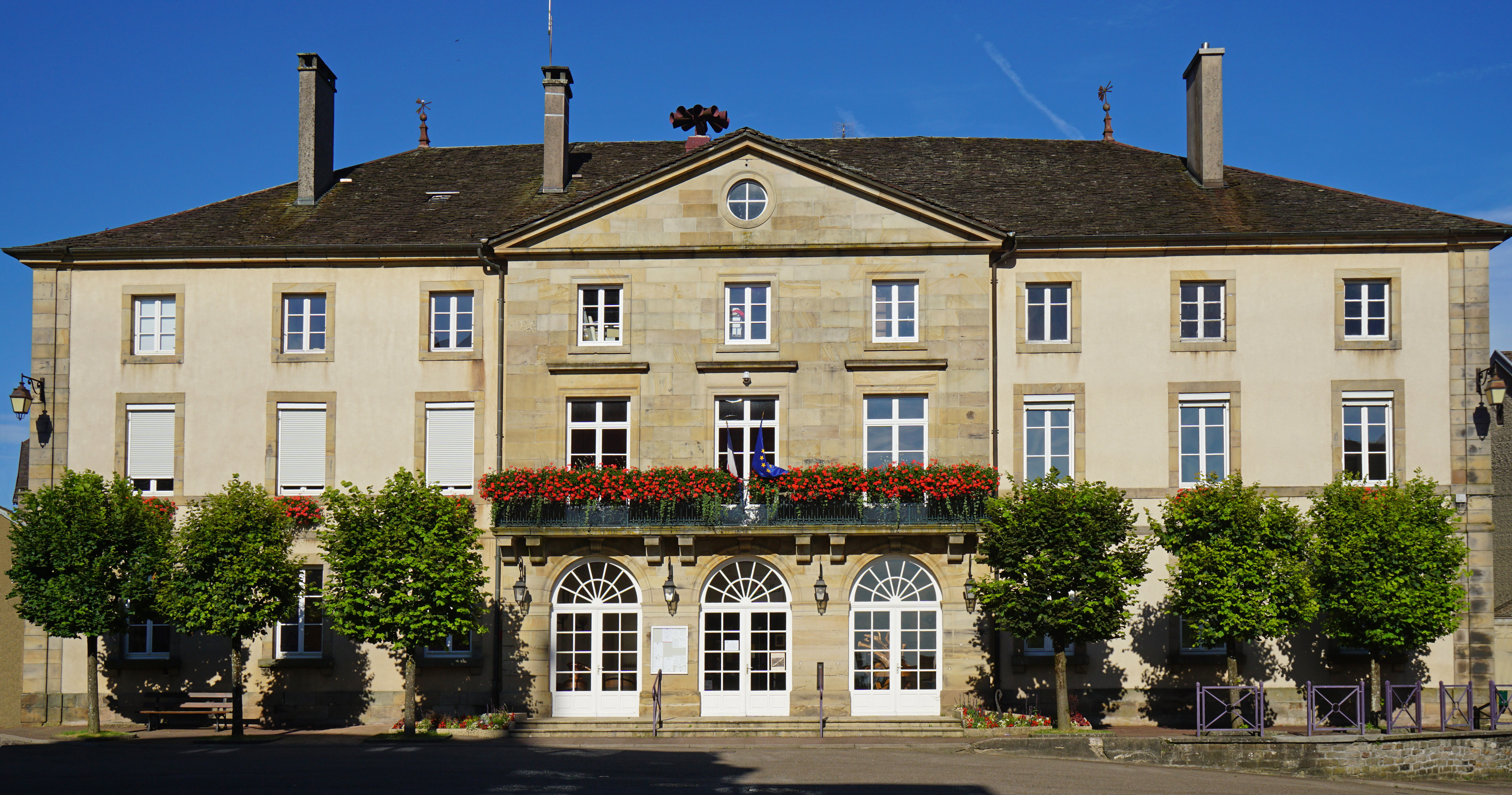 Mairie de Fougerolles (Haute-Saône).